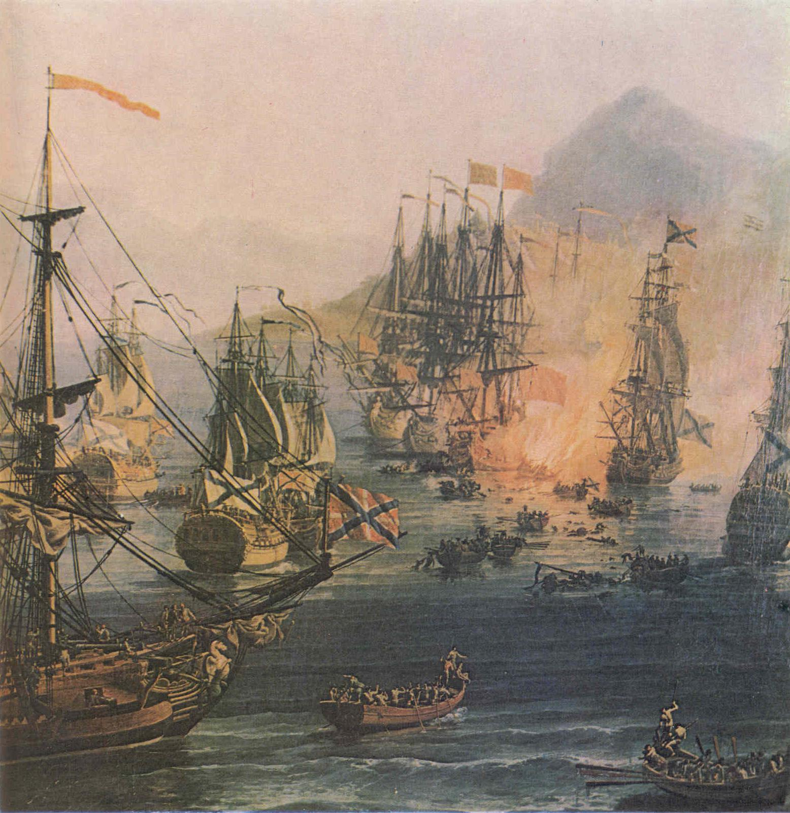 Фрагмент картины П. Ж. Волэра «Бой в Хиосском проливе»